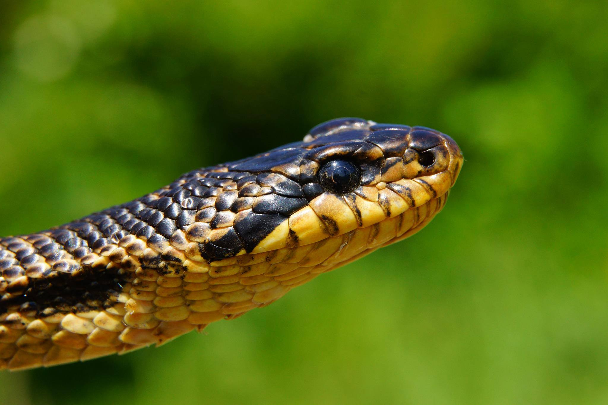 Portret de balaur dobrogean adult